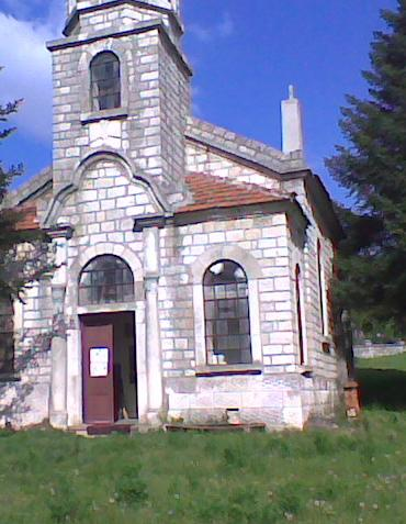 Църквата е построена през 1932-1934 г.